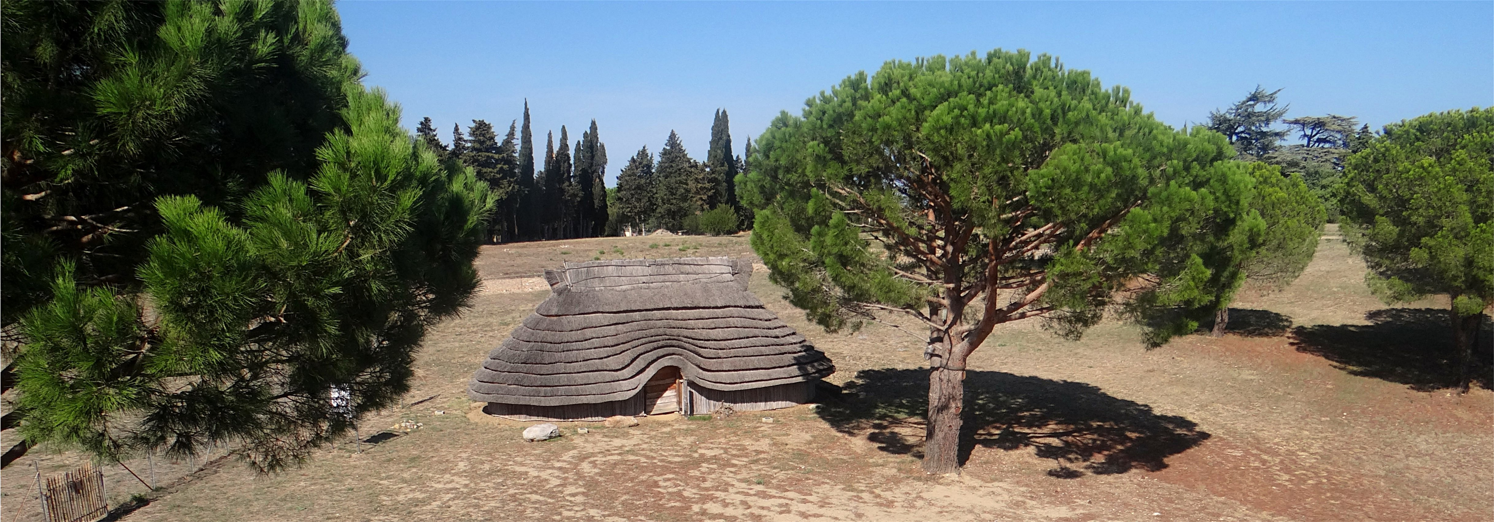 Hypothèse de restitution d'un habitat du premier âge de fer vue du belvédère du musée archéologique, Château-Roussillon, Pyrénées-Orientales, France.